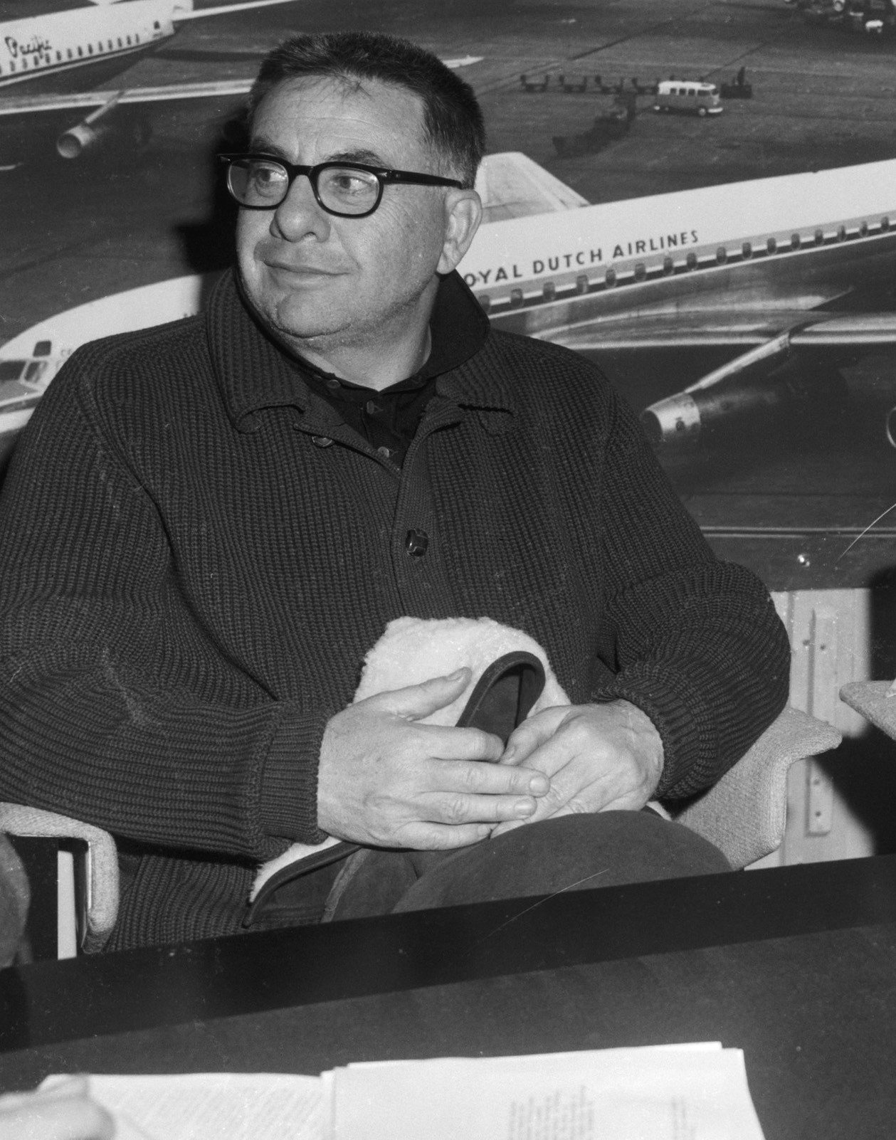 Collectie / Archief : Fotocollectie Anefo Reportage / Serie : [ onbekend ] Beschrijving : Liz Taylor en Richard Burton bij aankomst op Schiphol, waar zij een persconferentie geven, links de regisseur Martin Ritt [betreft film "The spy who came in from the cold", waarin Richard Burton de hoofdrol speelde, red.]. Datum : 26 april 1965 Locatie : Noord-Holland, Schiphol Trefwoorden : acteurs, actrices, filmsterren, persconferenties, regisseurs, vliegvelden Persoonsnaam : Burton, Richard, Ritt, Martin, Taylor, Elizabeth Fotograaf : Bilsen, Joop van / Anefo, [onbekend] Auteursrechthebbende : Nationaal Archief Materiaalsoort : Negatief (zwart/wit) Nummer archiefinventaris : bekijk toegang 2.24.01.04 Bestanddeelnummer : 917-6945